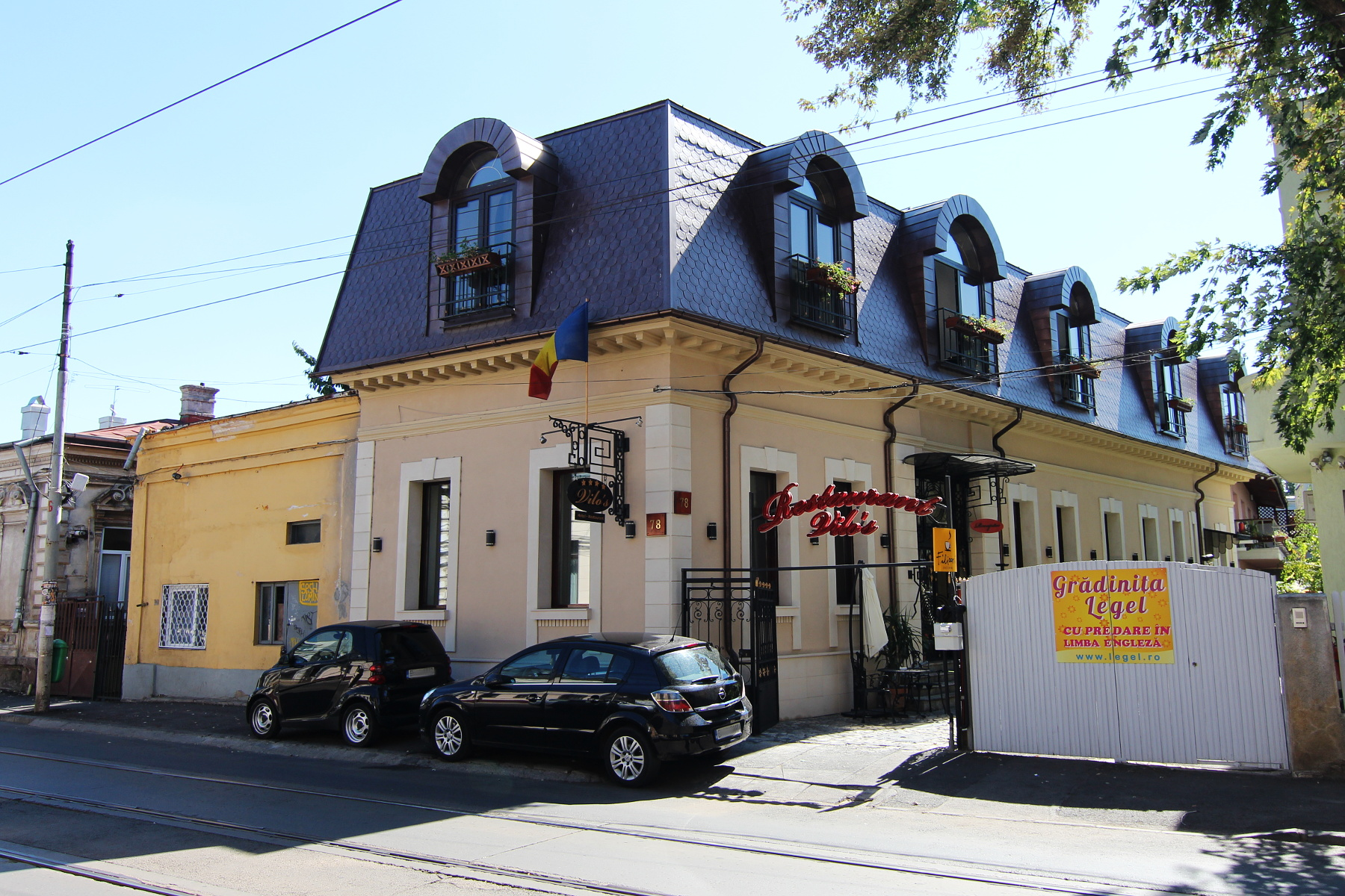 Casă pe Calea Călărașilor